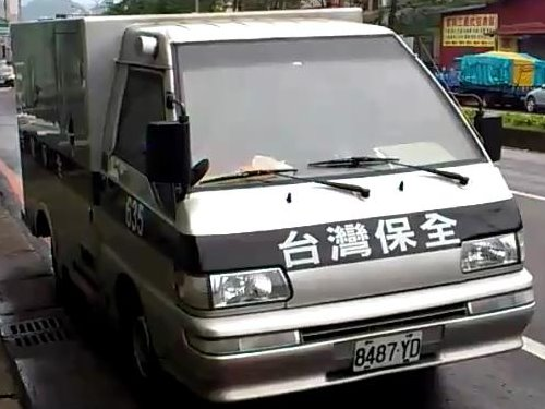 台灣保全三菱得利卡運鈔車8487-YD。